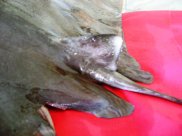 скат рода мобул